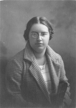 C.J. de Vogel in 1925 (elders: 1927). Bijschrift: "Cornelia - mijn duifje"